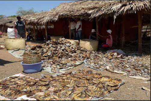 Poisson chec de lac d'Antsohihy